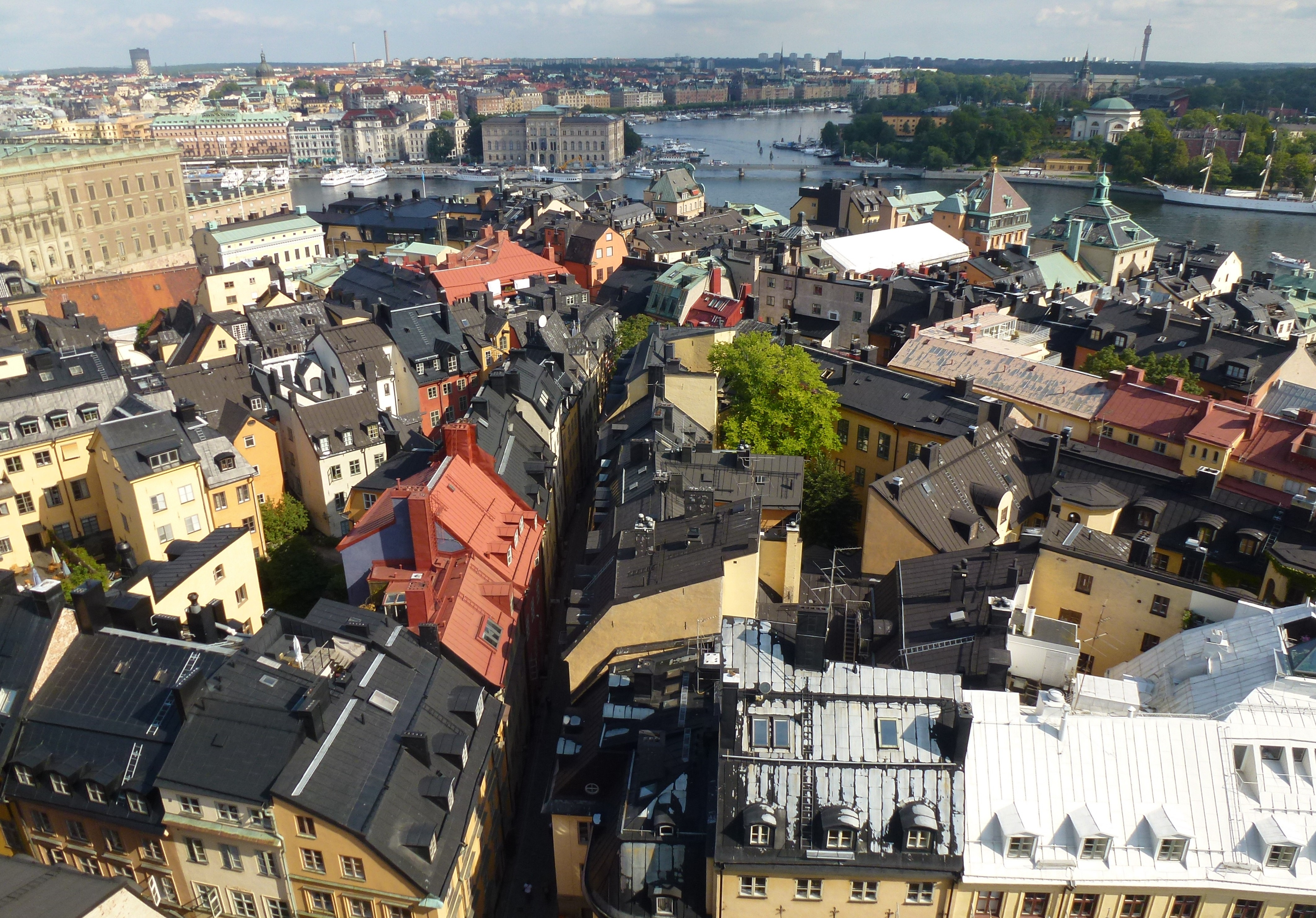 Tyska kyrkan vy mot ost med Kindstugatan i mitten